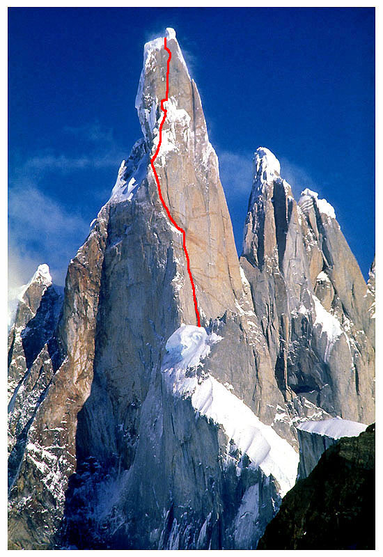 Tracé approximatif de la voie du compresseur sur le mont Cerro Torre.